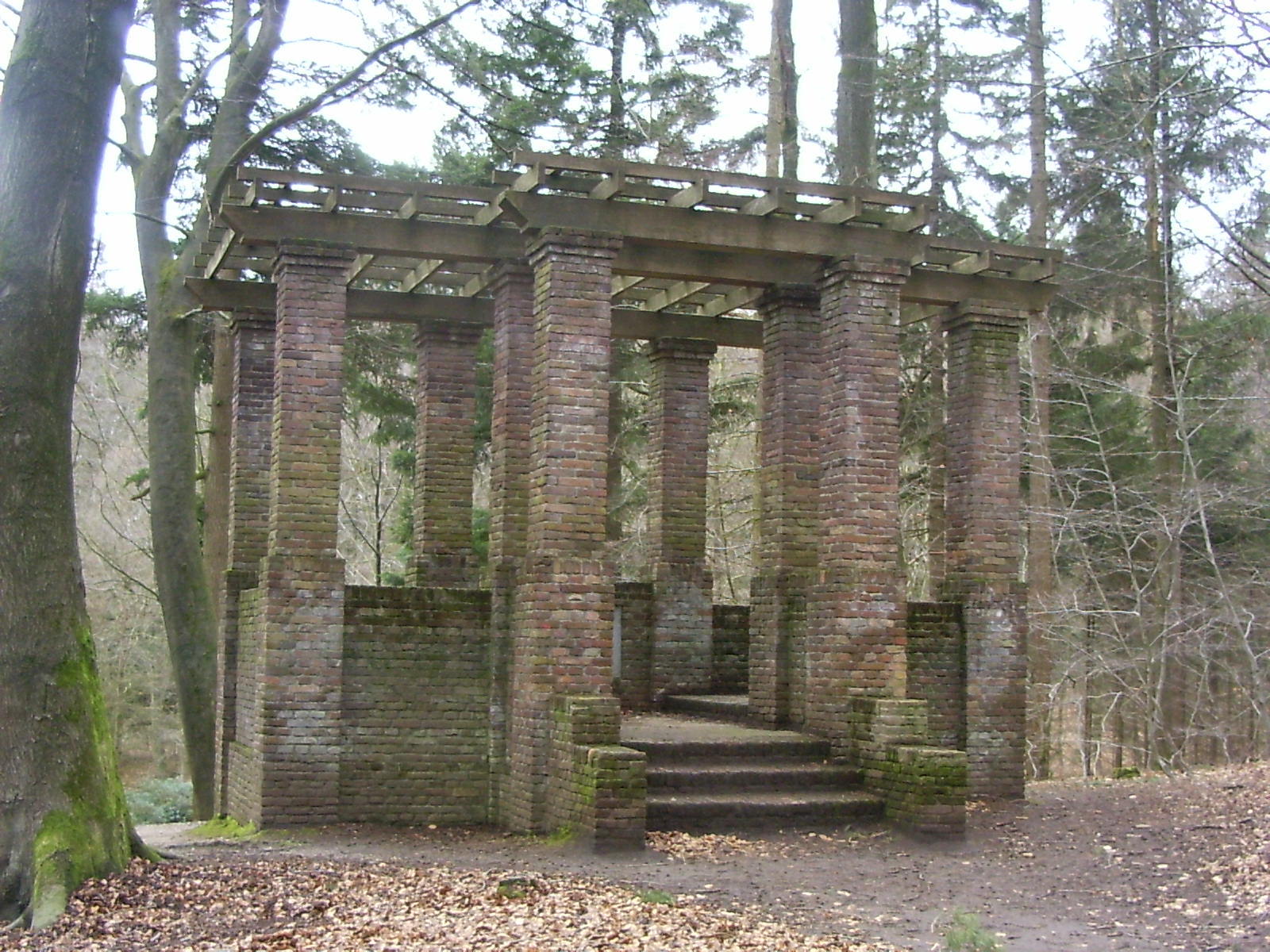 Oosterbeek, Hemelseberg, pergola, gemeentelijk monument 48